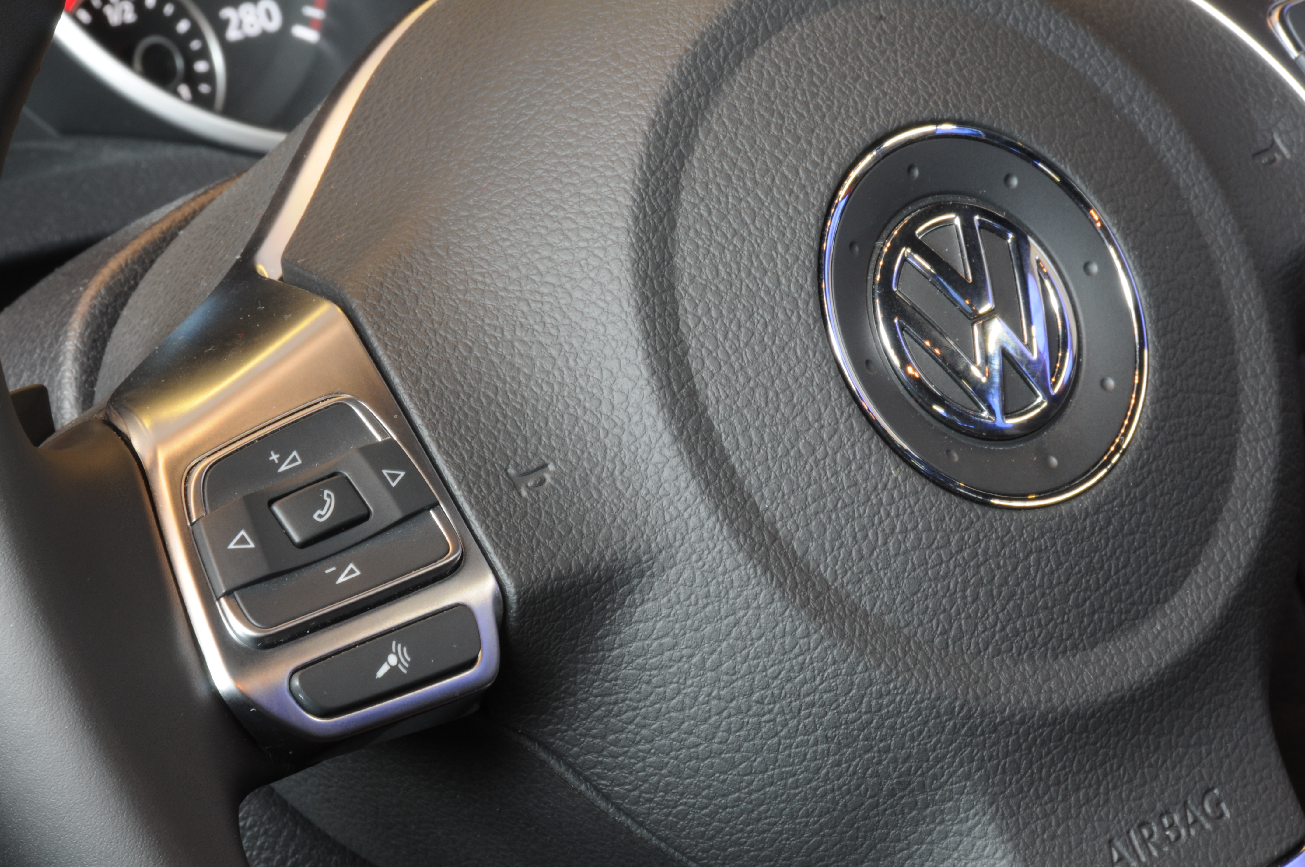 Detail Volkswagen